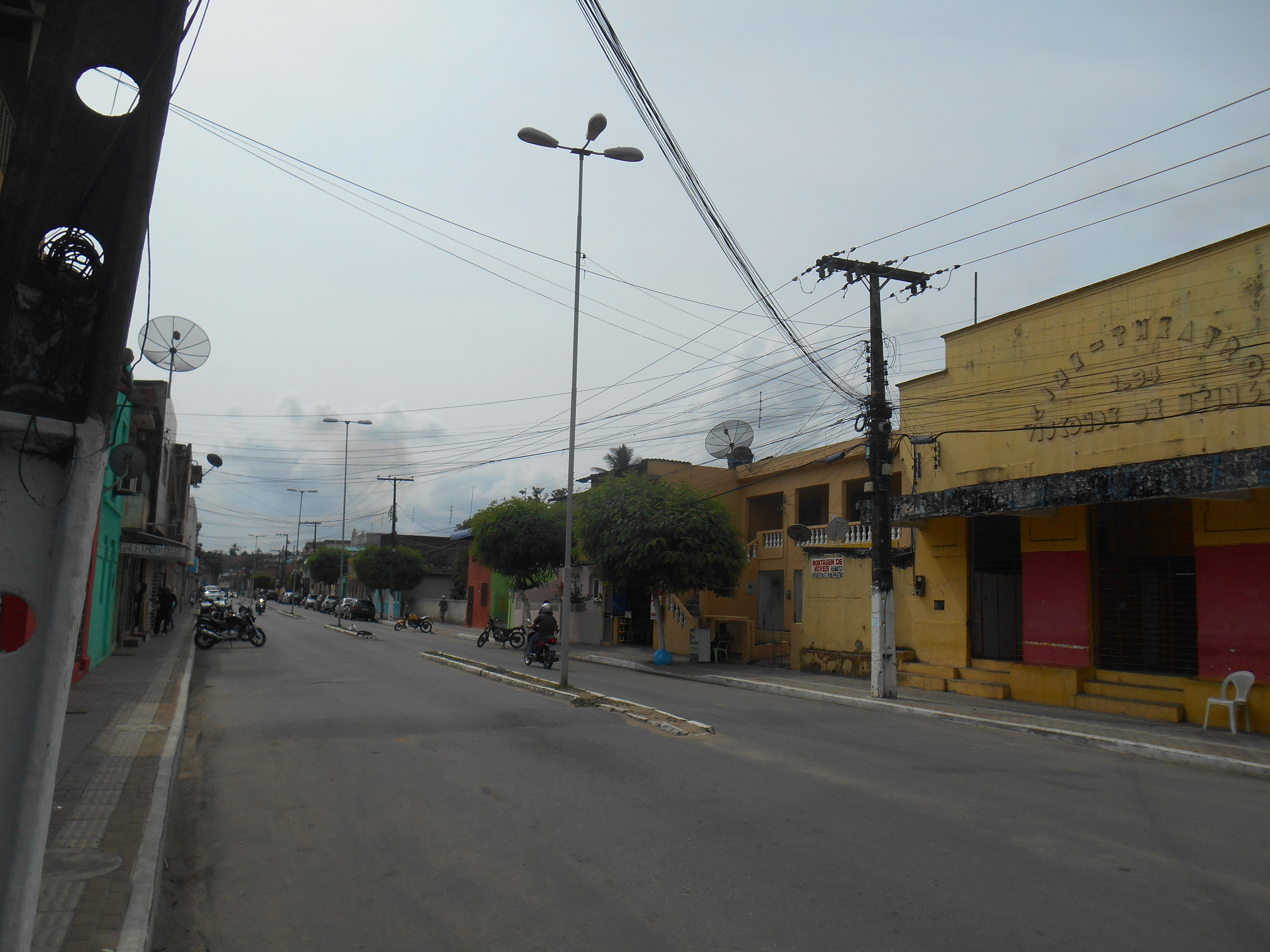 Avenida Visconde de Utinga, no município brasileiro de Escada, no Estado de Pernambuco.